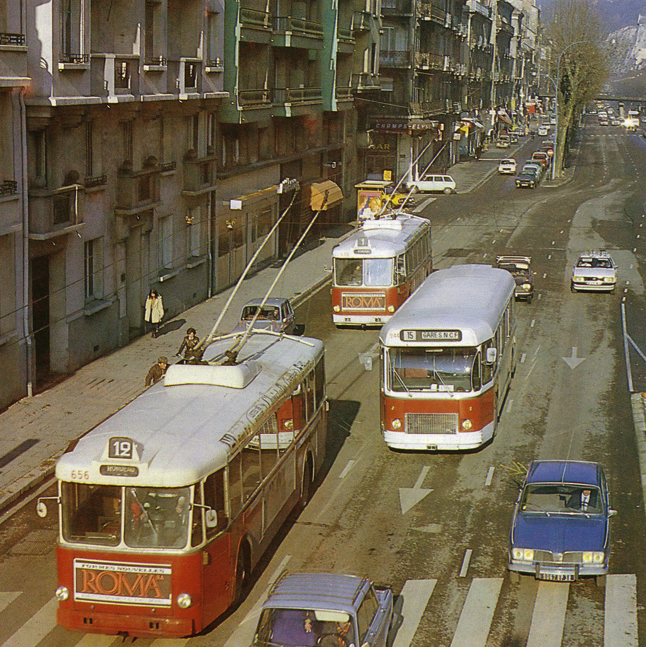 Deux Vetra VBF et un Saviem SC10 roulant Cours Jean Jaures à Grenoble